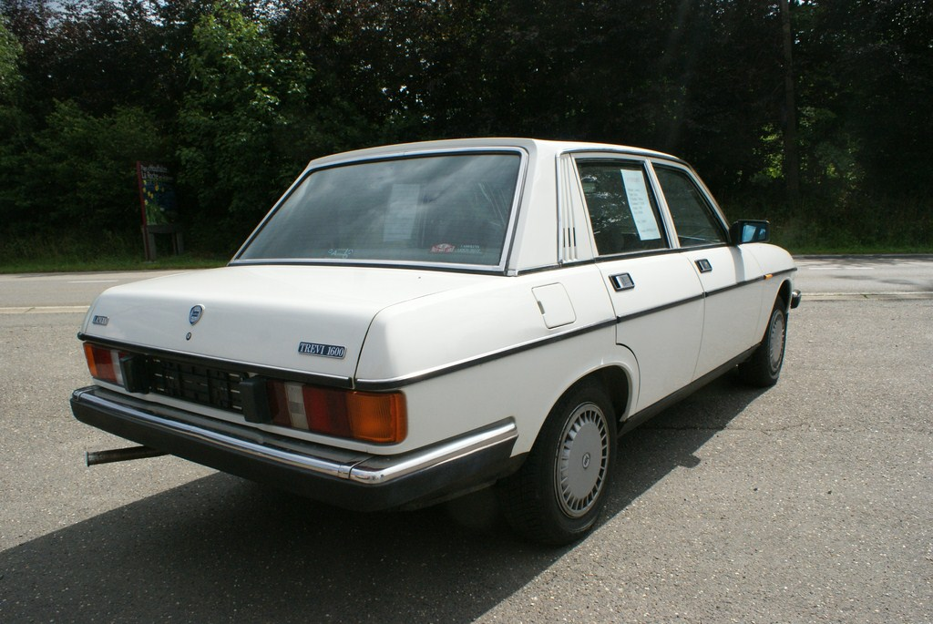 Garage Lambin, Houffalize